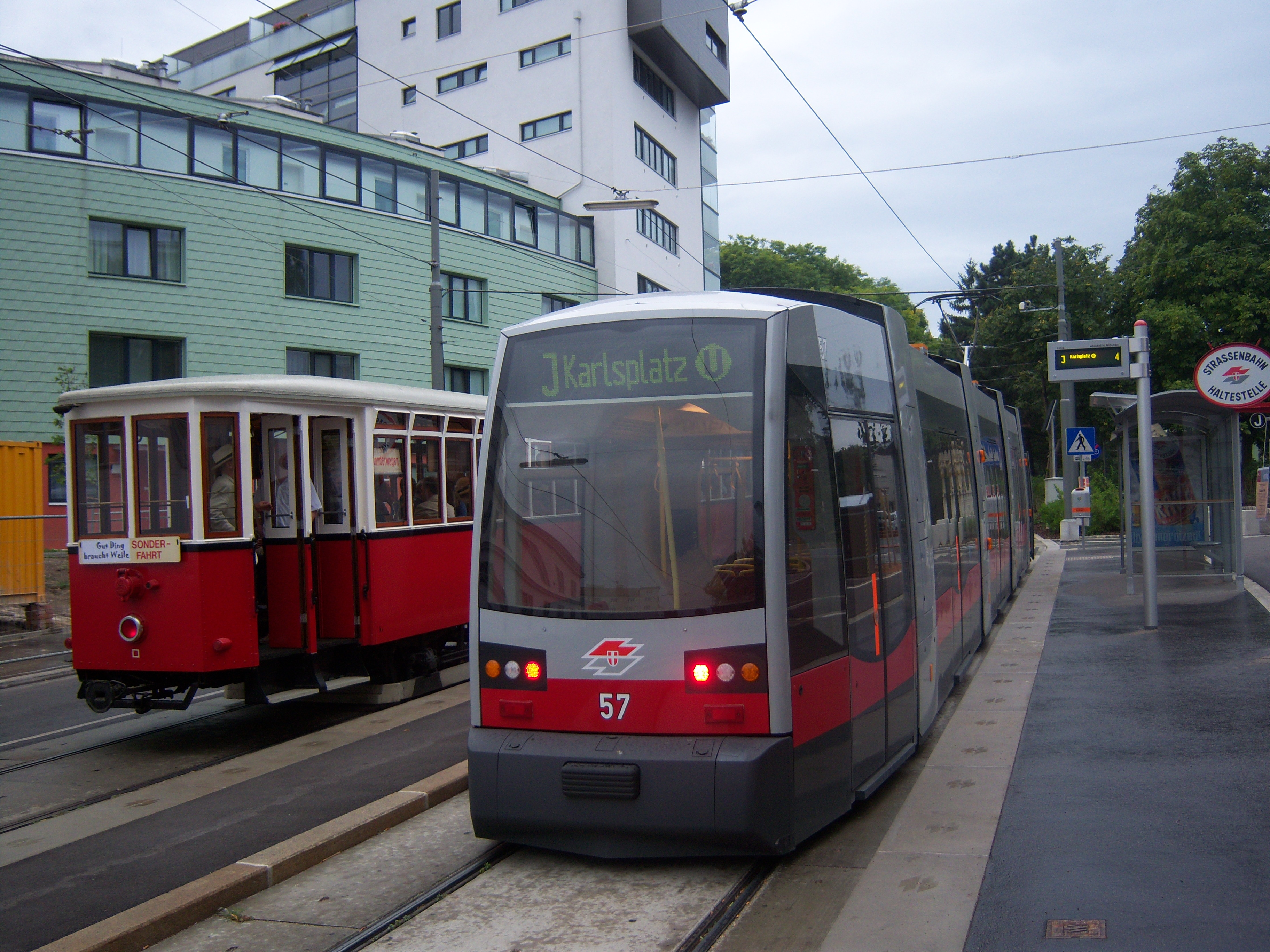 Endstelle der Linie J in Ottakring